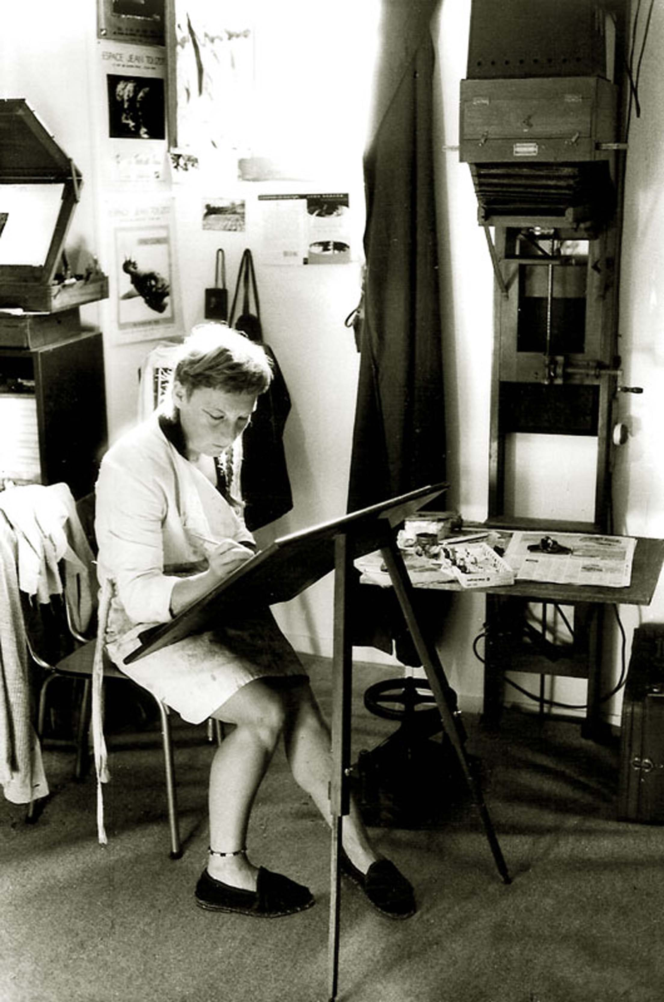 Portrait de la photographe Katia Boyadjian, fille de Angelo Boyadjian dans son labo à Reviers, Basse-Normandie en 2003